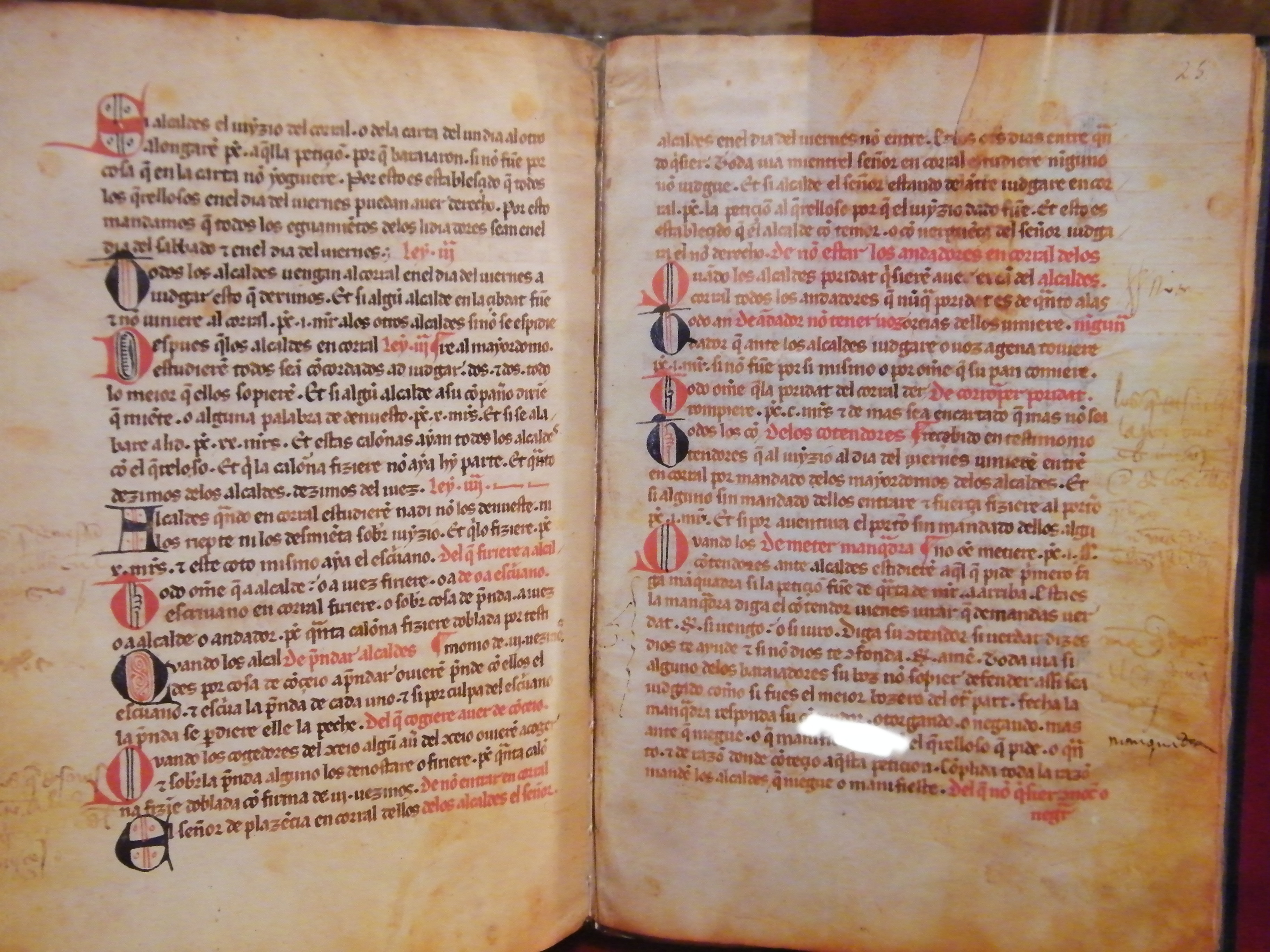 Facsímil del Fuero de la fundación de la ciudad de Plasencia en 1186.